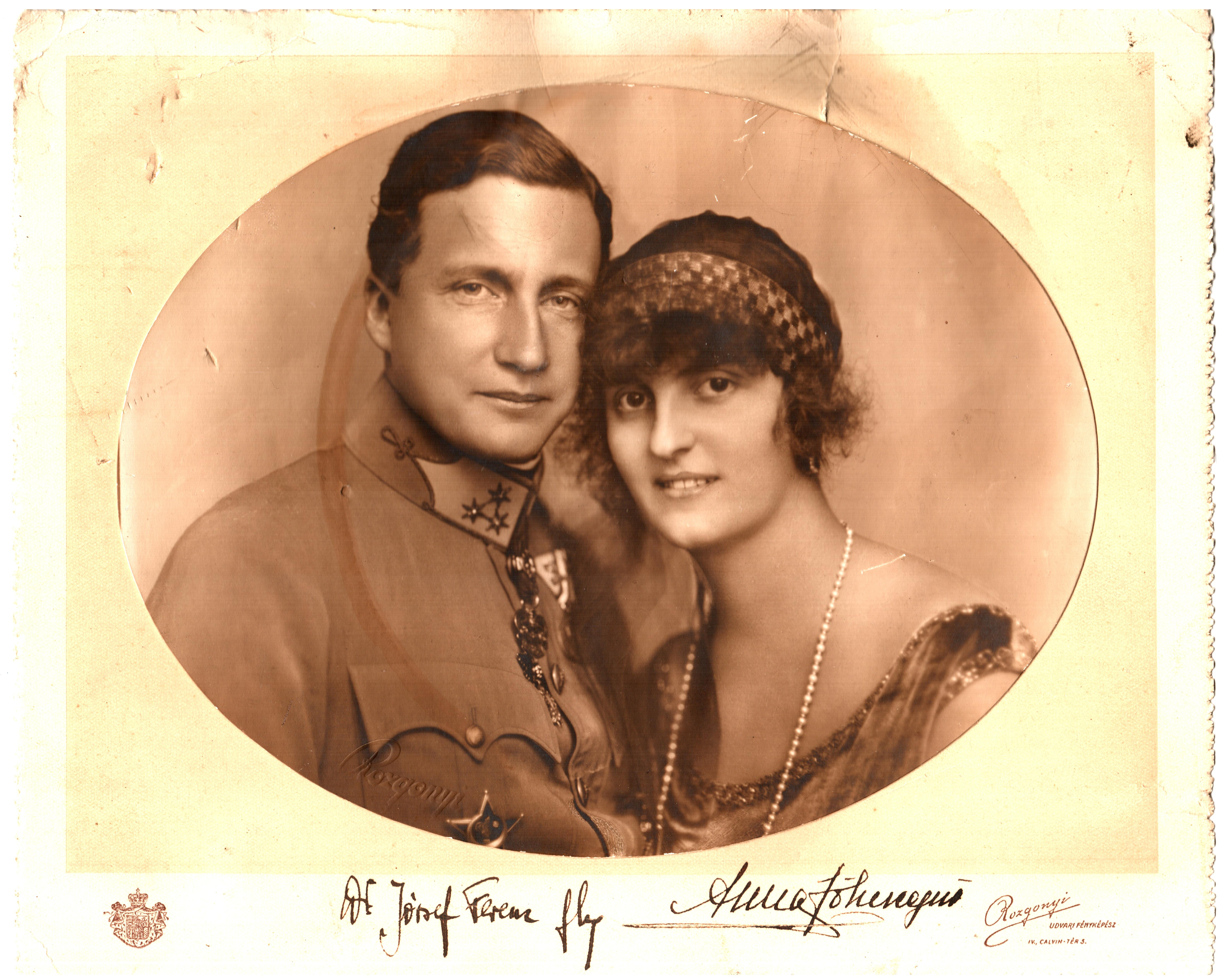 A fényképet 2012 július 13 -án szkenneltem. Az ismeretlen magyar fényképész fényképe több mint 70 éve, feltehetően az 1920-as évek elején készült, amikor Anna Mónika Pia szász hercegnő jegyben járt József Ferenc főherceggel. Anna Mónika Pia (1903-1976) Habsburg–Toscanai Lujza Antonietta főhercegnő leánya 1924-től József Ferenc főherceg felesége. A felvétel megjelent Creative Commons alatt a Metapolisz DVD sorozatban.